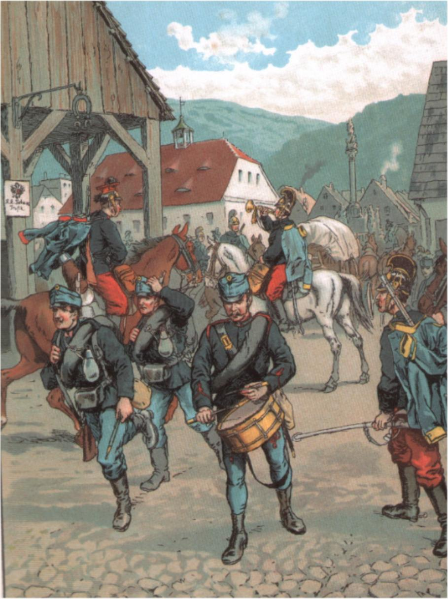 Alarm